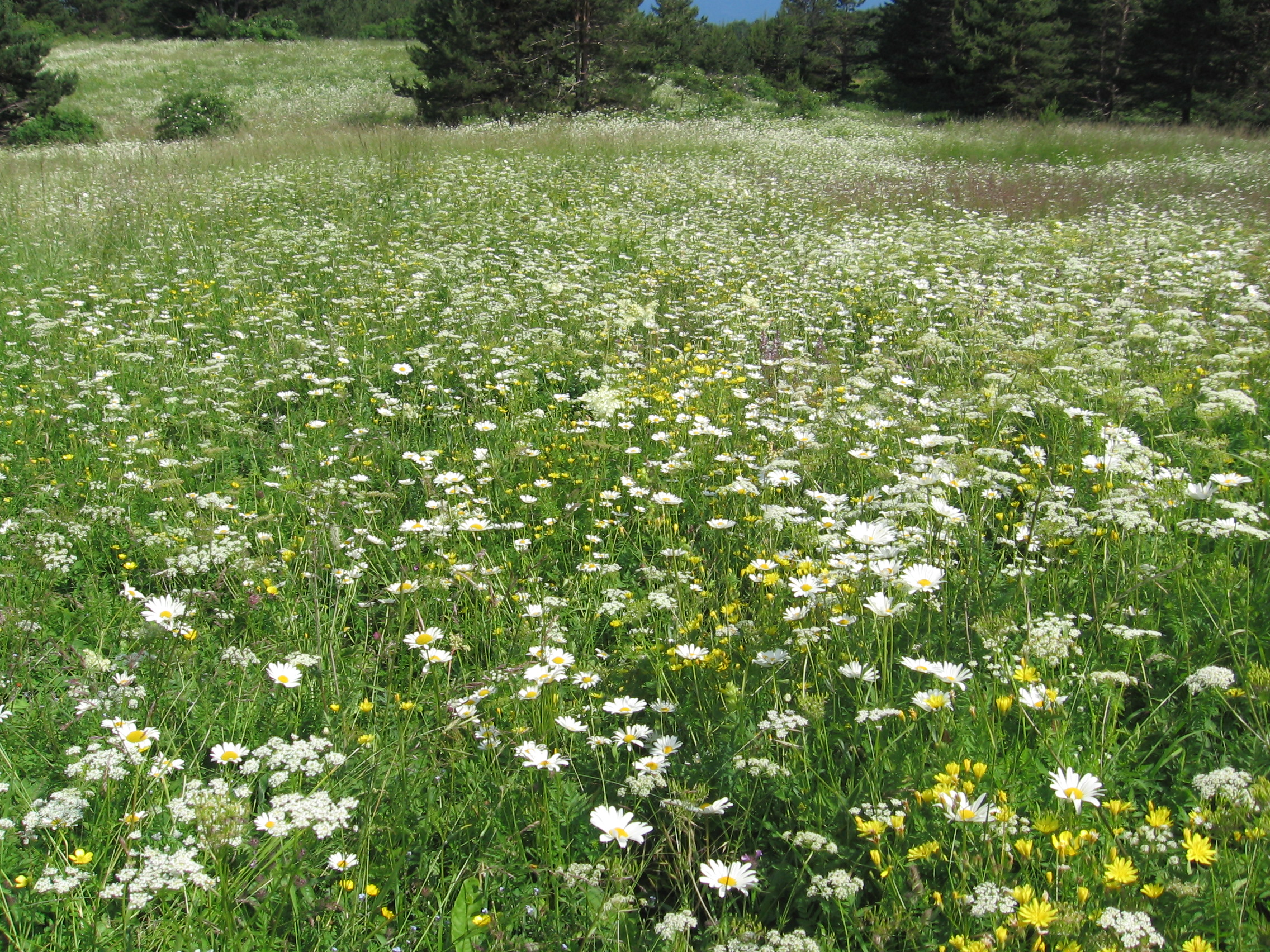 Фото